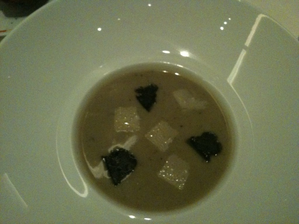 Soupe de poireaux et d'artichaut à la truffe noire et au parmesan